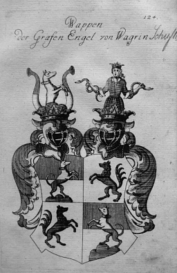 Kupferstich: Wappen der Grafen Engl von Wagrain